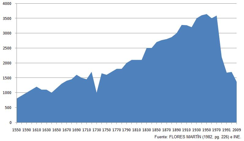 Población de Macotera en la provincia de Salamanca, (1550-2009).